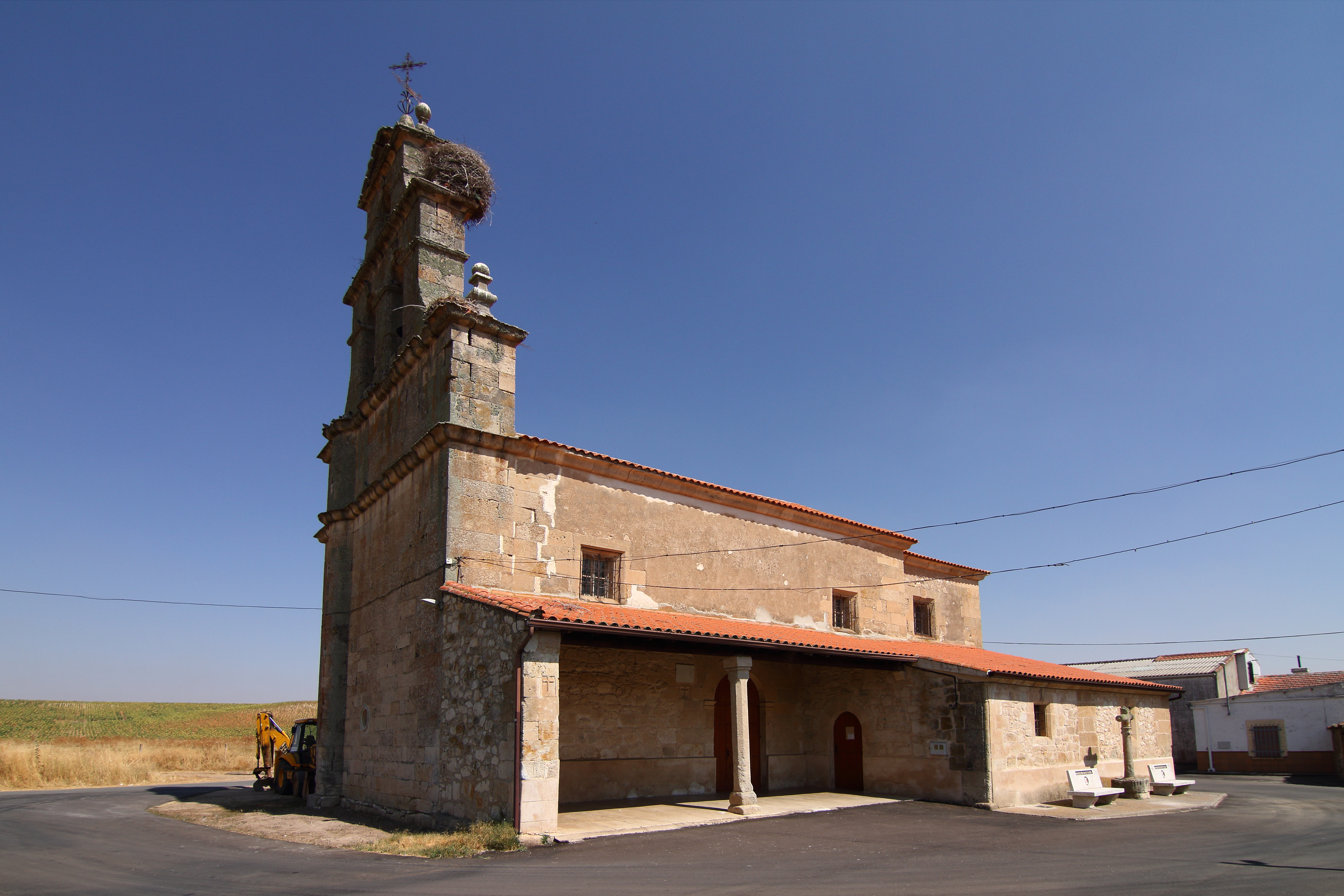 Iglesia de Valdunciel